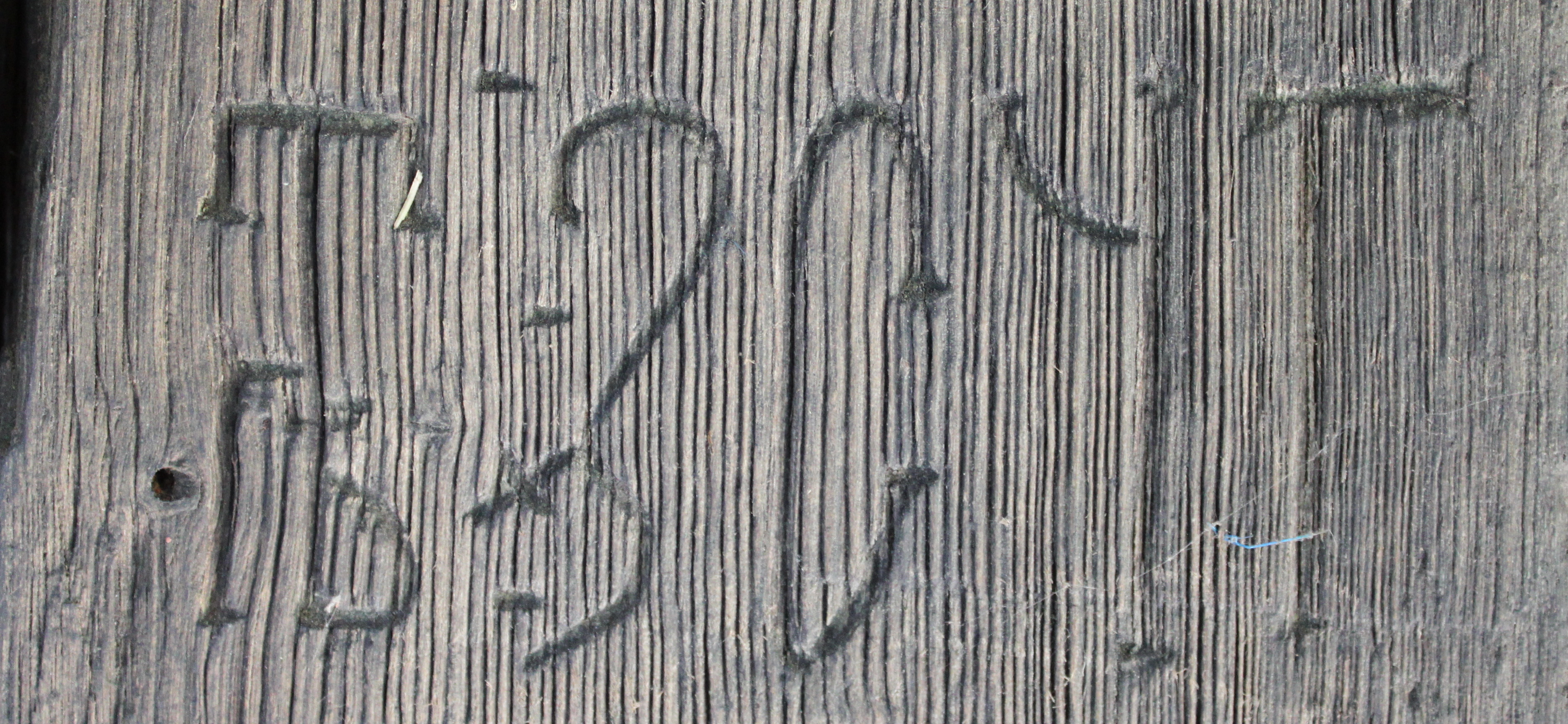 Biserica de lemn din Drăganu-Olteni, judeţul Argeş.